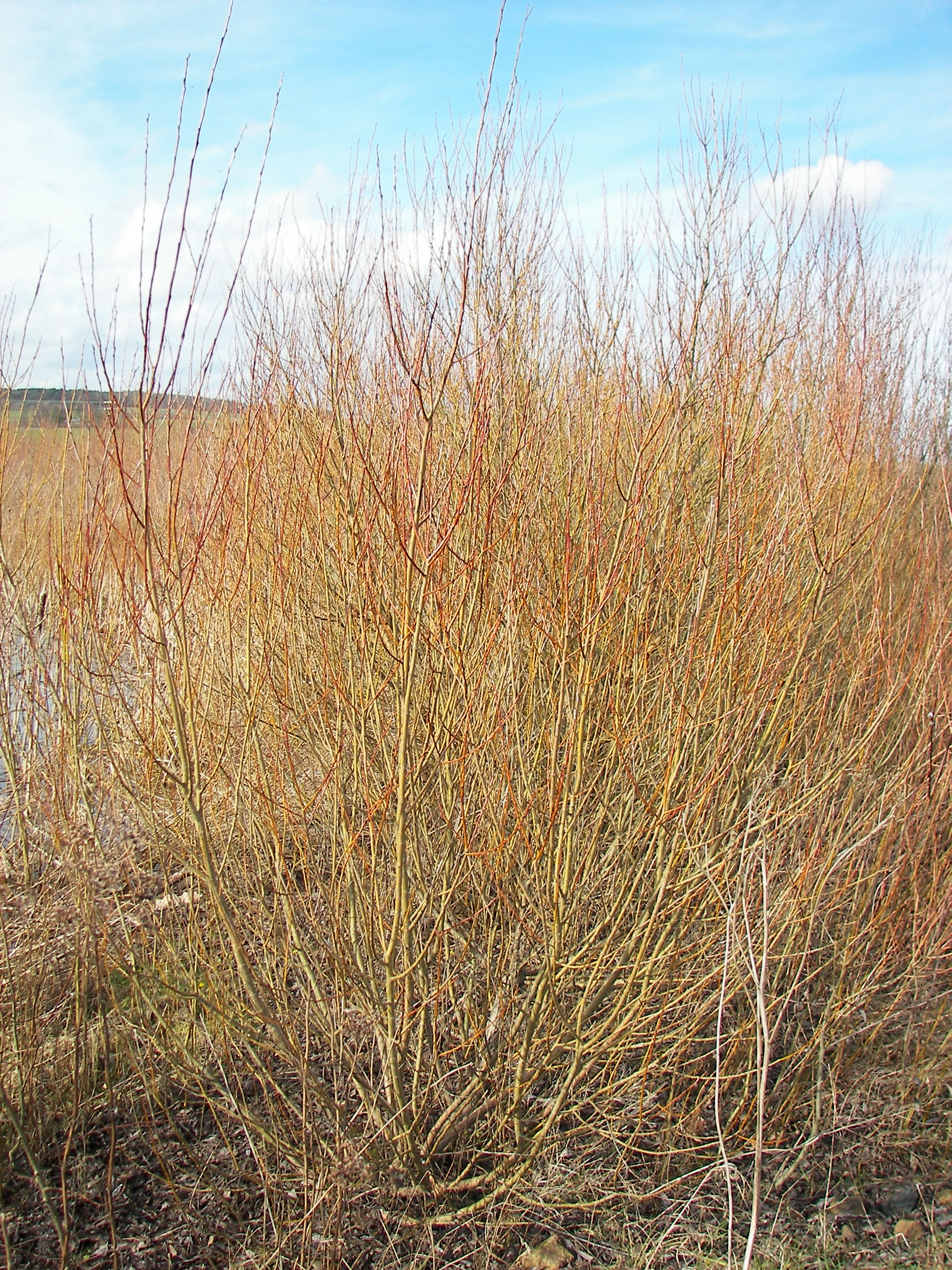 Purpurweise (Salix purpurea) bei Lahntal-Goßfelden, Landkreis Marburg-Biedenkopf, Hessen, Deutschland